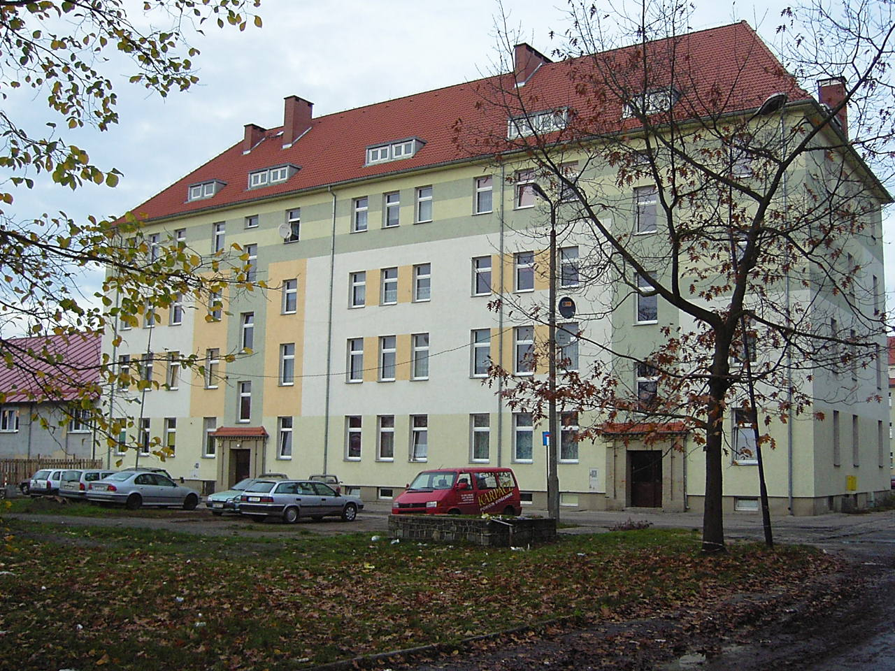 Budynek koszarowy 66 (14) bsap z Kostrzyna. Zdjecie późniejsze.